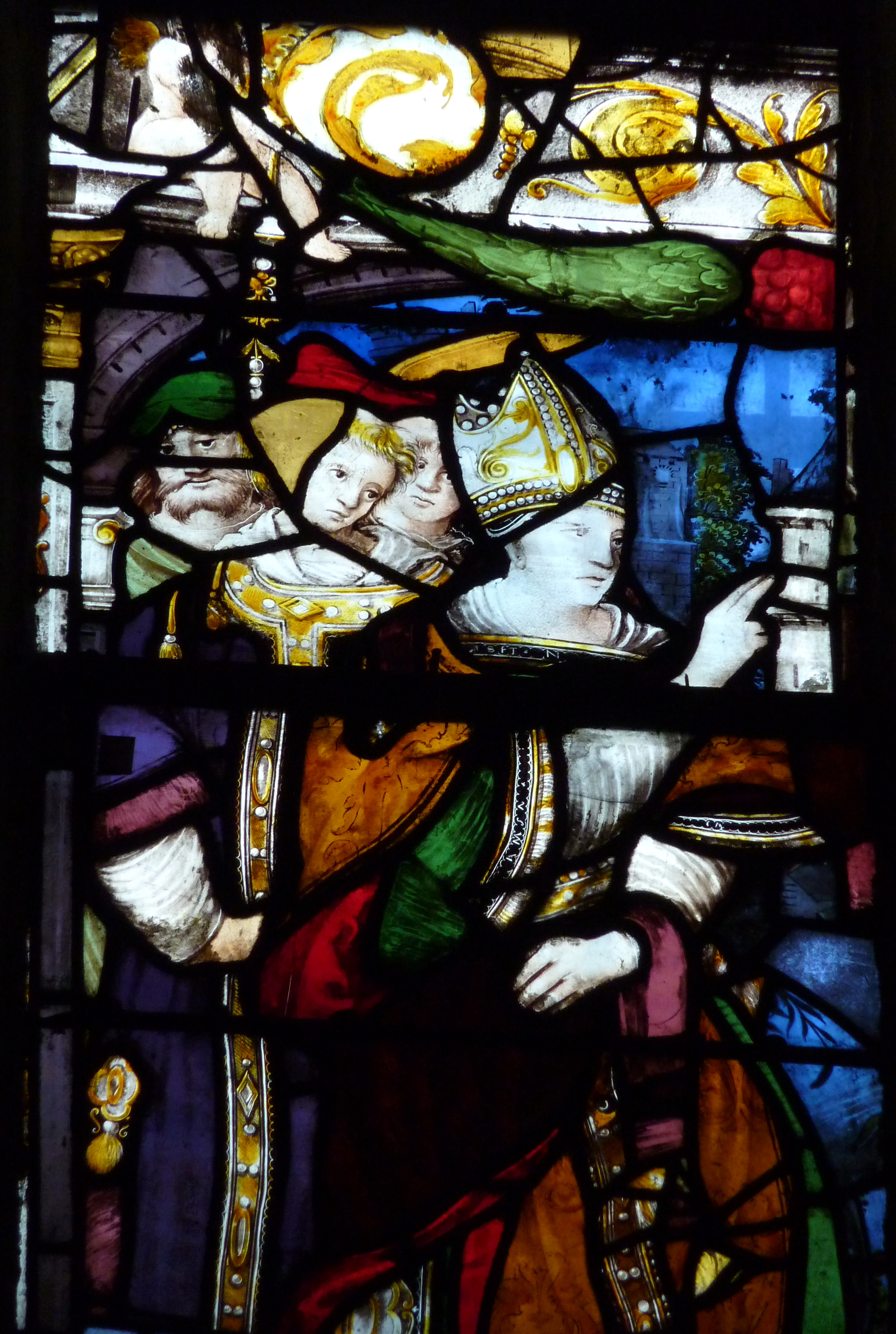 Katholische Pfarrkirche Saint-Aspais in Melun im Département Seine-et-Marne in der Region Île-de-France (Frankreich), Bleiglasfenster aus dem 16. Jahrhundert, Darstellung: Szenen aus dem Leben des hl. Lupus von Sens (Saint-Loup)